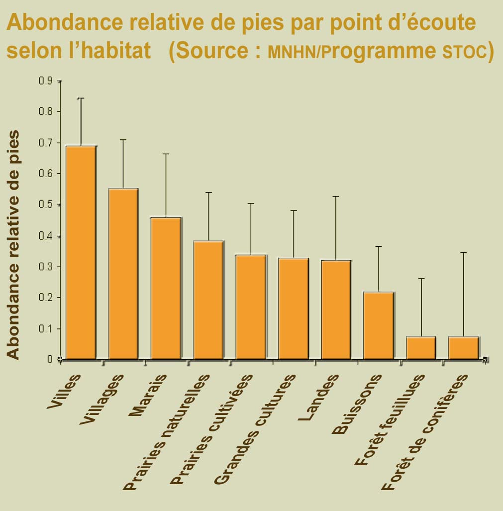 Indice d'abondance des pies bavardes (Pica pica) en France, selon le Programme STOC